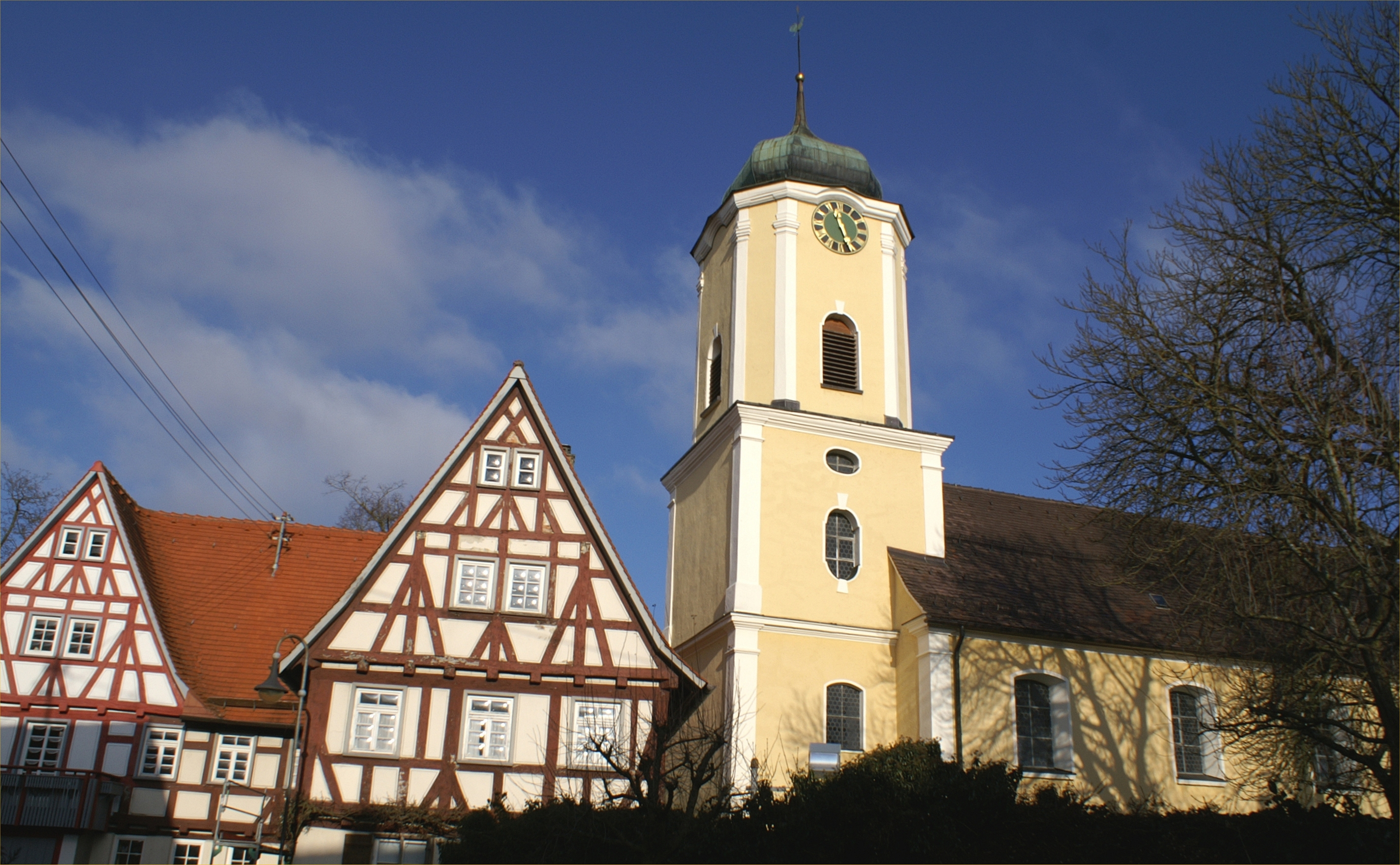 Evangelische St. Vitus-Kirche in Türkheim im Landkreis Göppingen